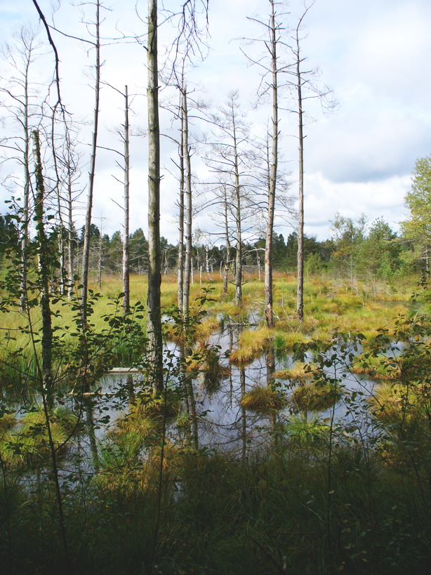 Wurzacher Ried, infolge Wasserspiegelanhebung am Torfstecherweg absterbende Bäume, 2005 selbst fotografiert von User:enslin am Torfstecherweg 11.9.2005